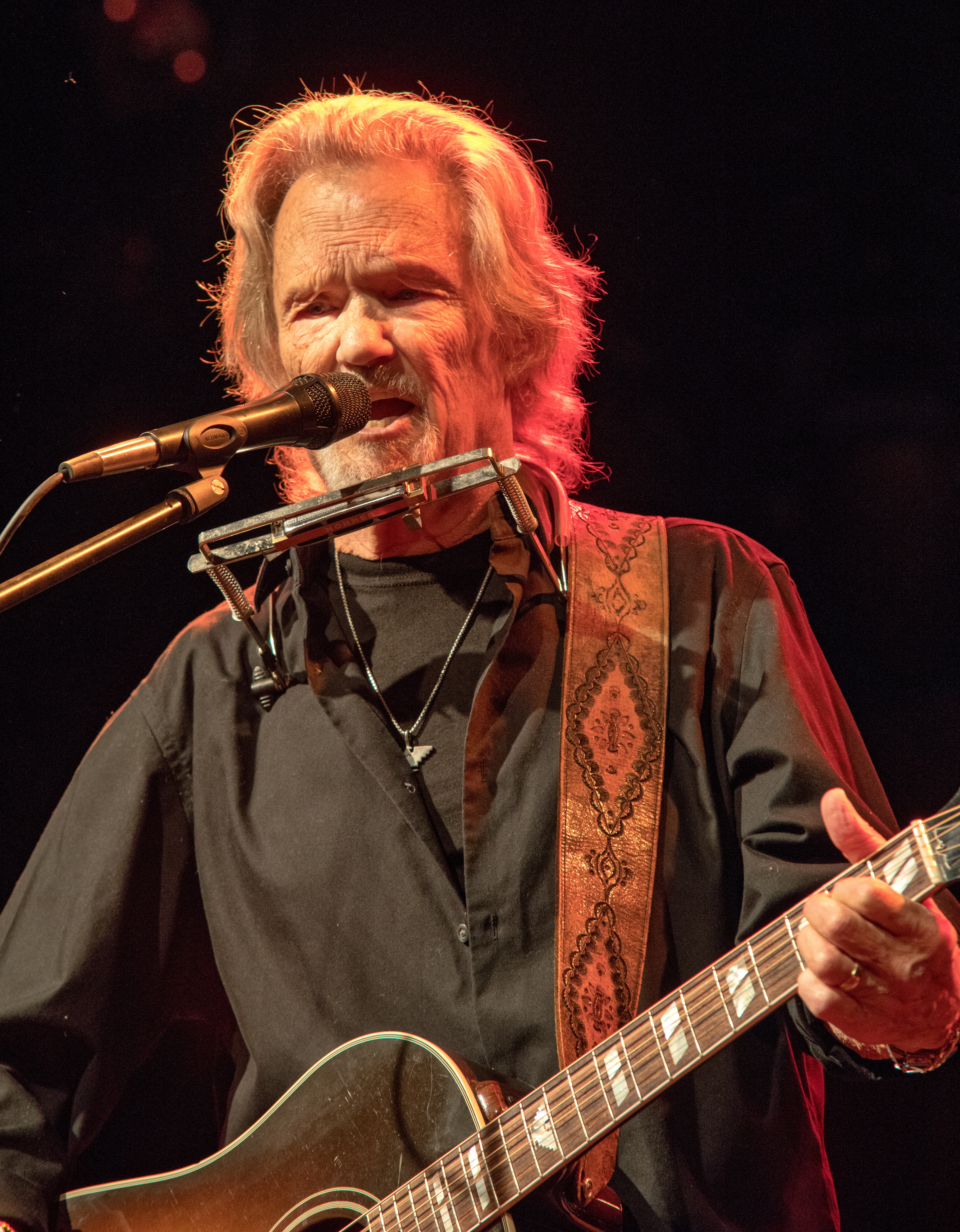 Bilder vom Zelt Musik Festival 2017 in Freiburg im Breisgau Kris Kristofferson